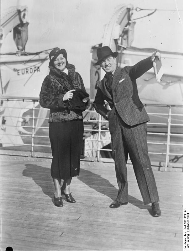 Opernstars auf dem Wege nach Amerika ! Die bekannte Kammersängerin Charlotte Boerner und der berühmte italienische Tenor der Mailänder Scala, Maestro Atto Retti-Marsani an Bord des Schnelldampfers "Europa" auf dem Wege nach Amerika.